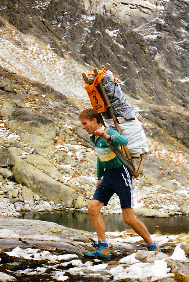 Fotografia je z pretekov horských nosičom Sherpa rallye v roku 1993 z Hrebienka na Téryho chatu vo Vysokých Tatrách